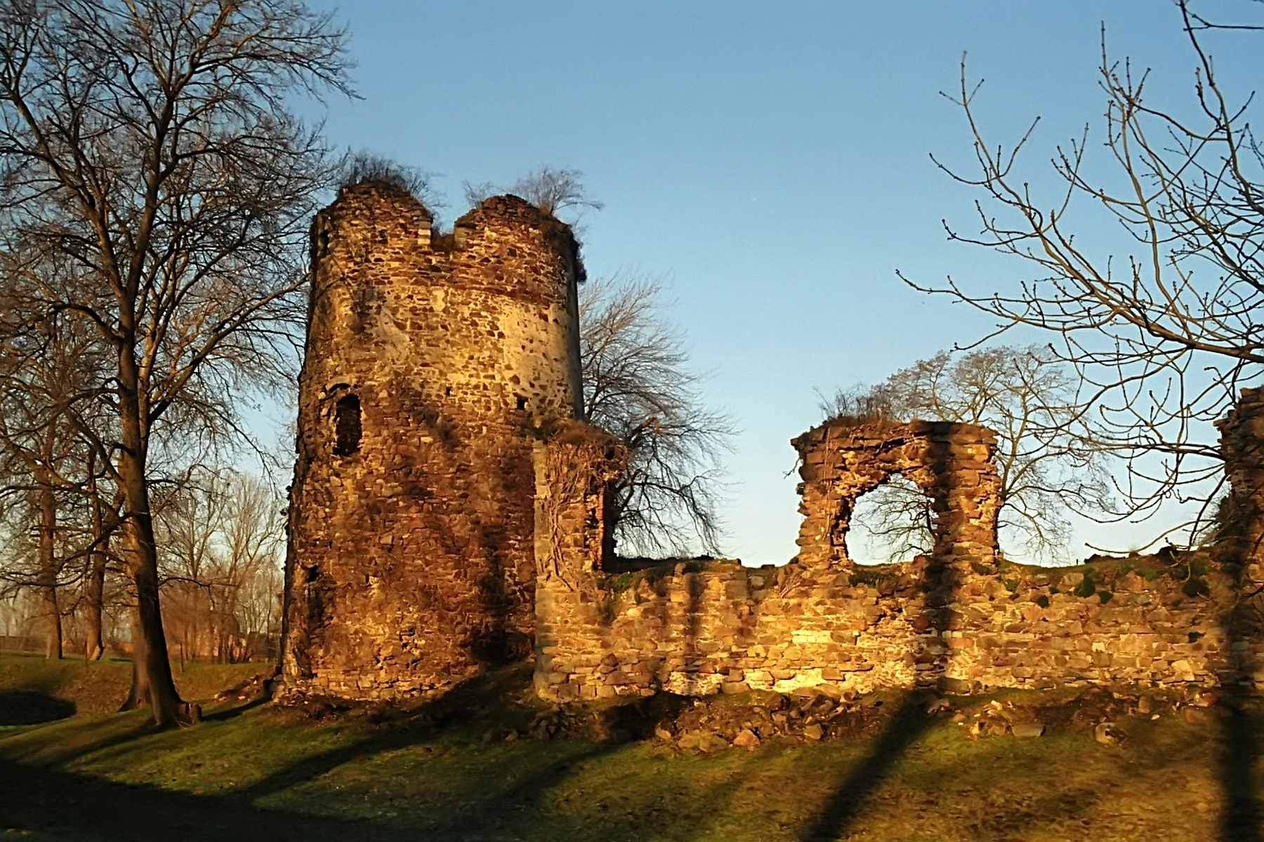 Belgique - Wallonie - Château de Walhain